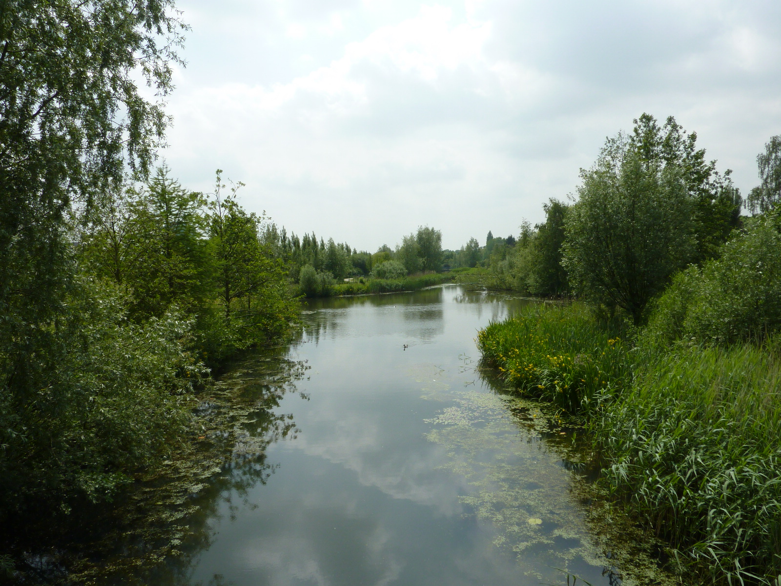 Beeld van het Meentpark in De Meern